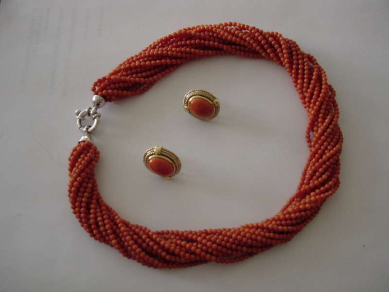 Voorbeeld van een sieraad met bloedkoraal